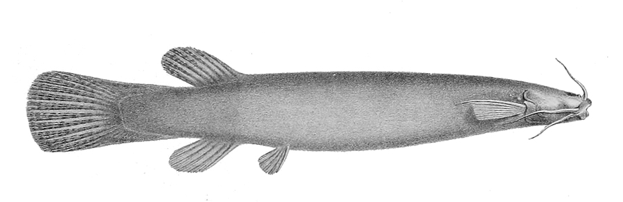 Ituglanis amazonicus